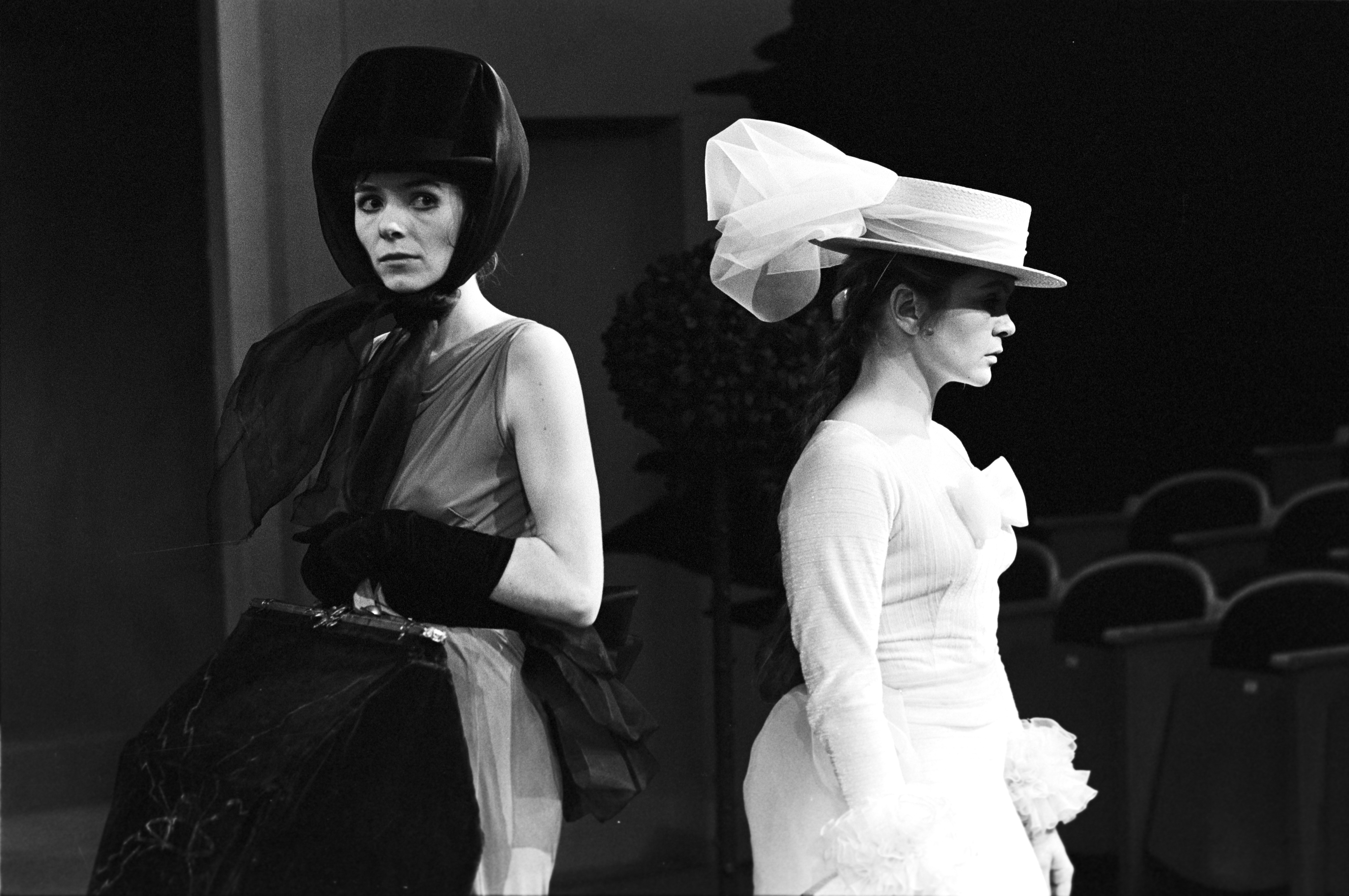 Scene fra Nationaltheaterets oppsetning av Georg Büchners "Leonce og Lena". Forestillingen hadde premiere 21. mars 1972. Edith Roger hadde regi, Lubos Hruza scenografi og Lita Prahl og Lubos Hruza kostymer. Oslo